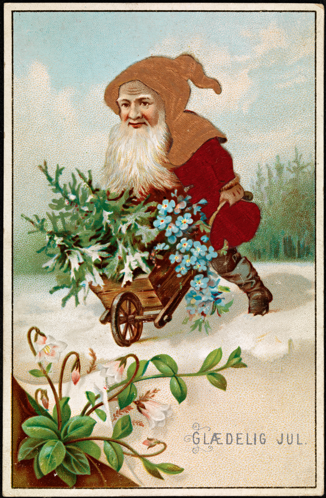 Tittel / Title: Glædelig Jul, 1885 Motiv / Motif: Postkort / julekort / overrekkelseskort. Dato / Date: 1885 Kunstner / Artist: ukjent / unknown Utgiver / Publisher: ukjent / unknown Eier / Owner Institution: Nasjonalbiblioteket / National Library of Norway Lenke / Link: Bildesignatur / Image Number: blds_04540